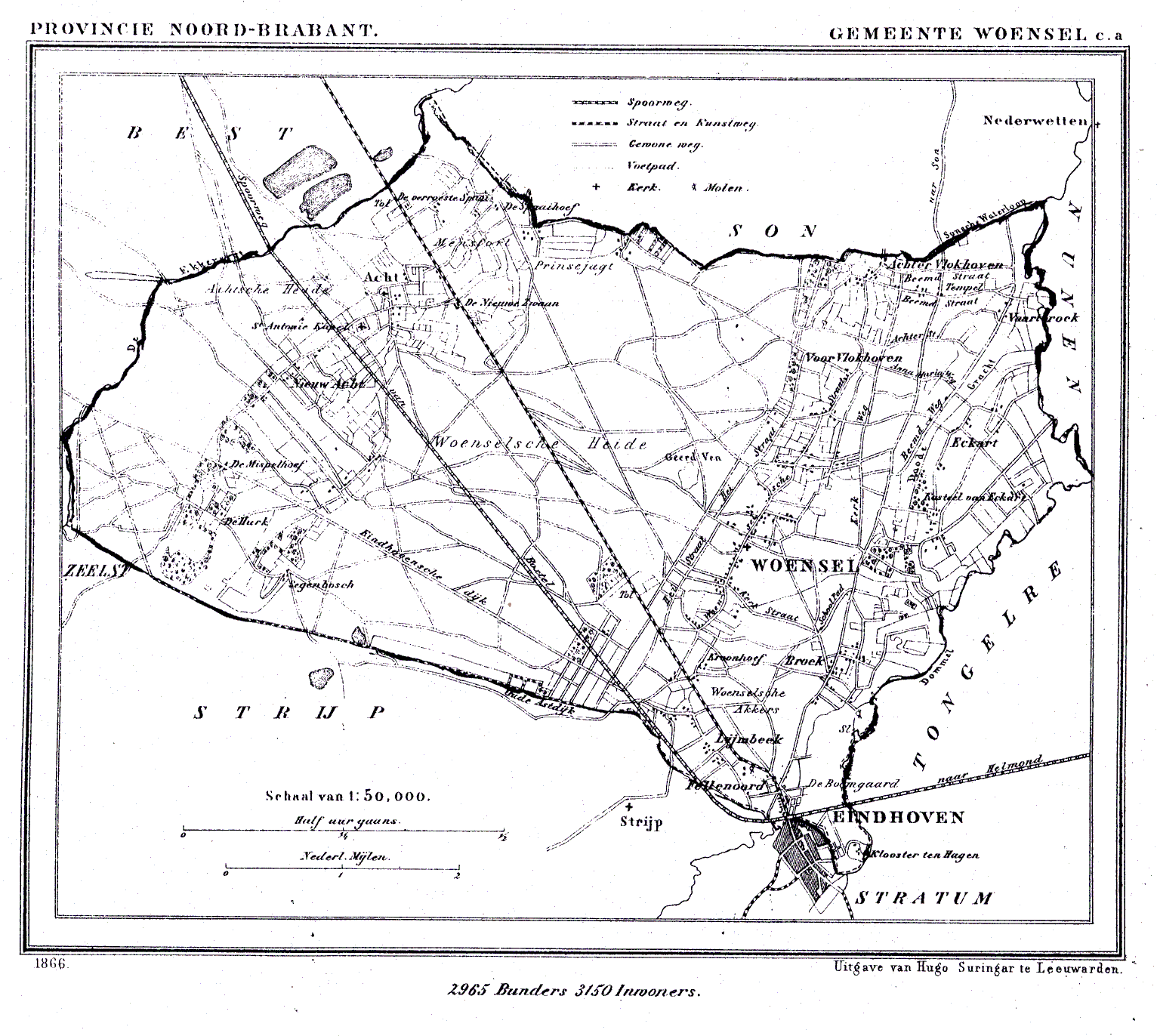 Nederland, Noord-Brabant, Gemeente Woensel